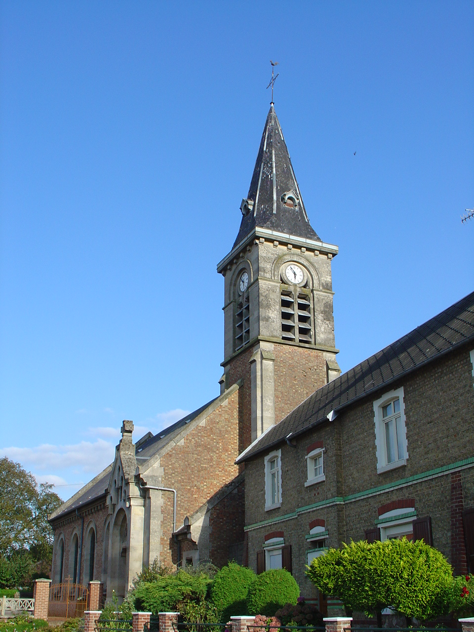 Église Saint-Vaast de Blairville